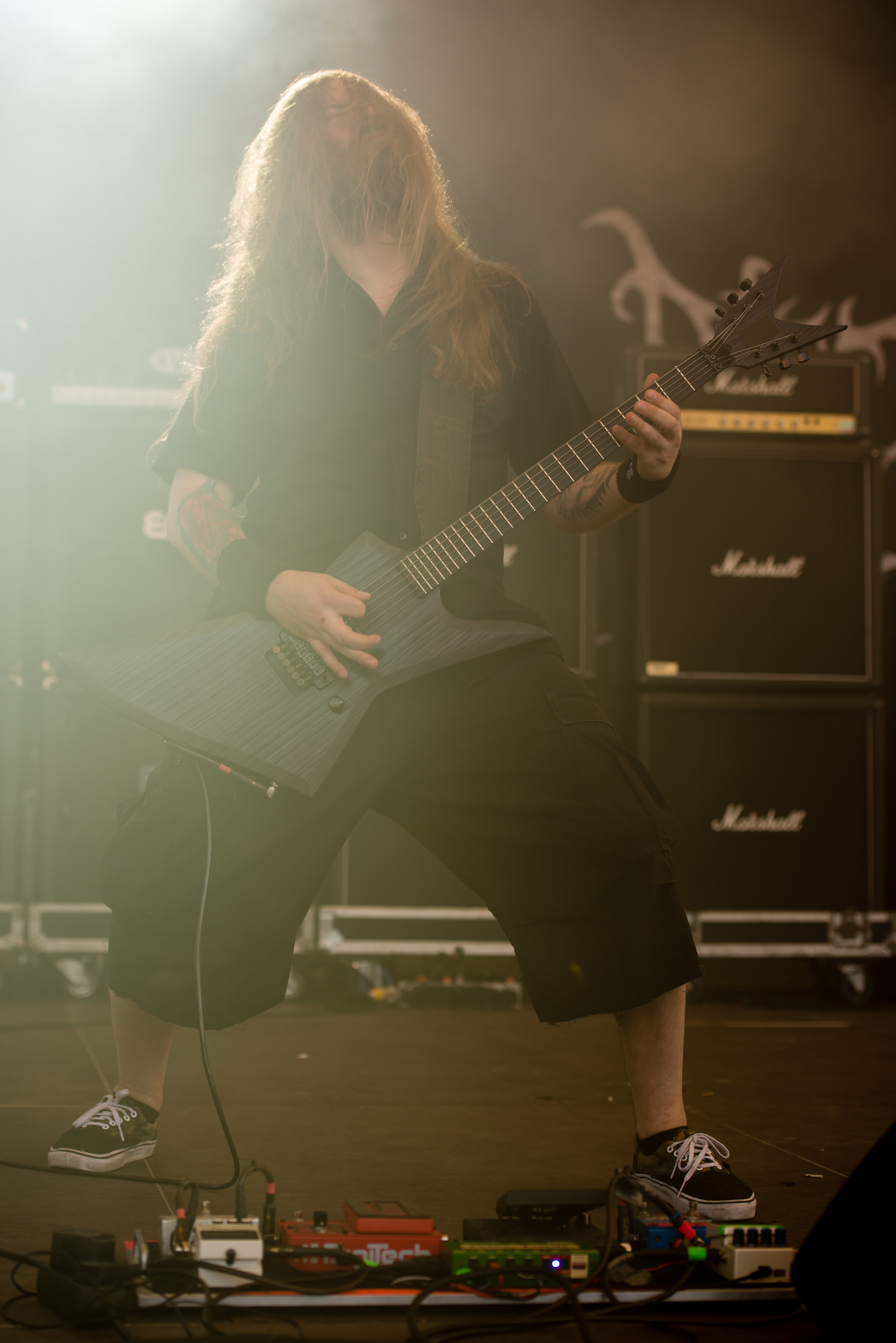 'Rock Hard Festival 2014 - Gelsenkirchen': 'Decapitated'